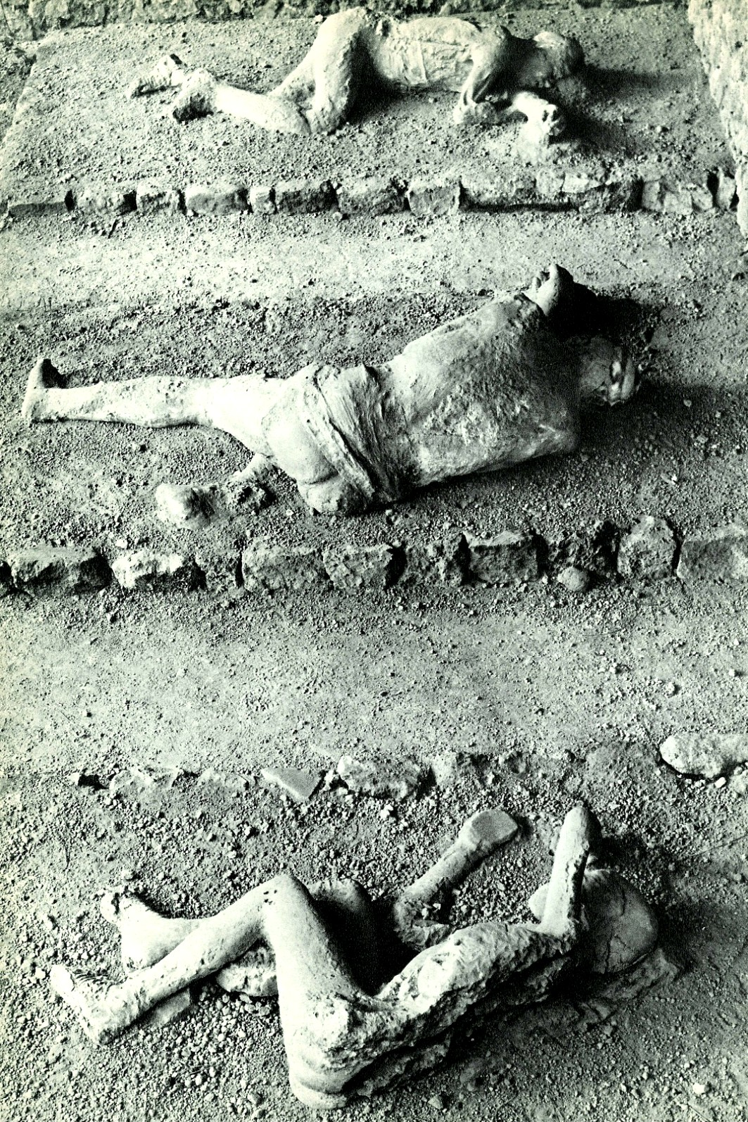 Cadáveres en Porta Nocera, en Pompeya